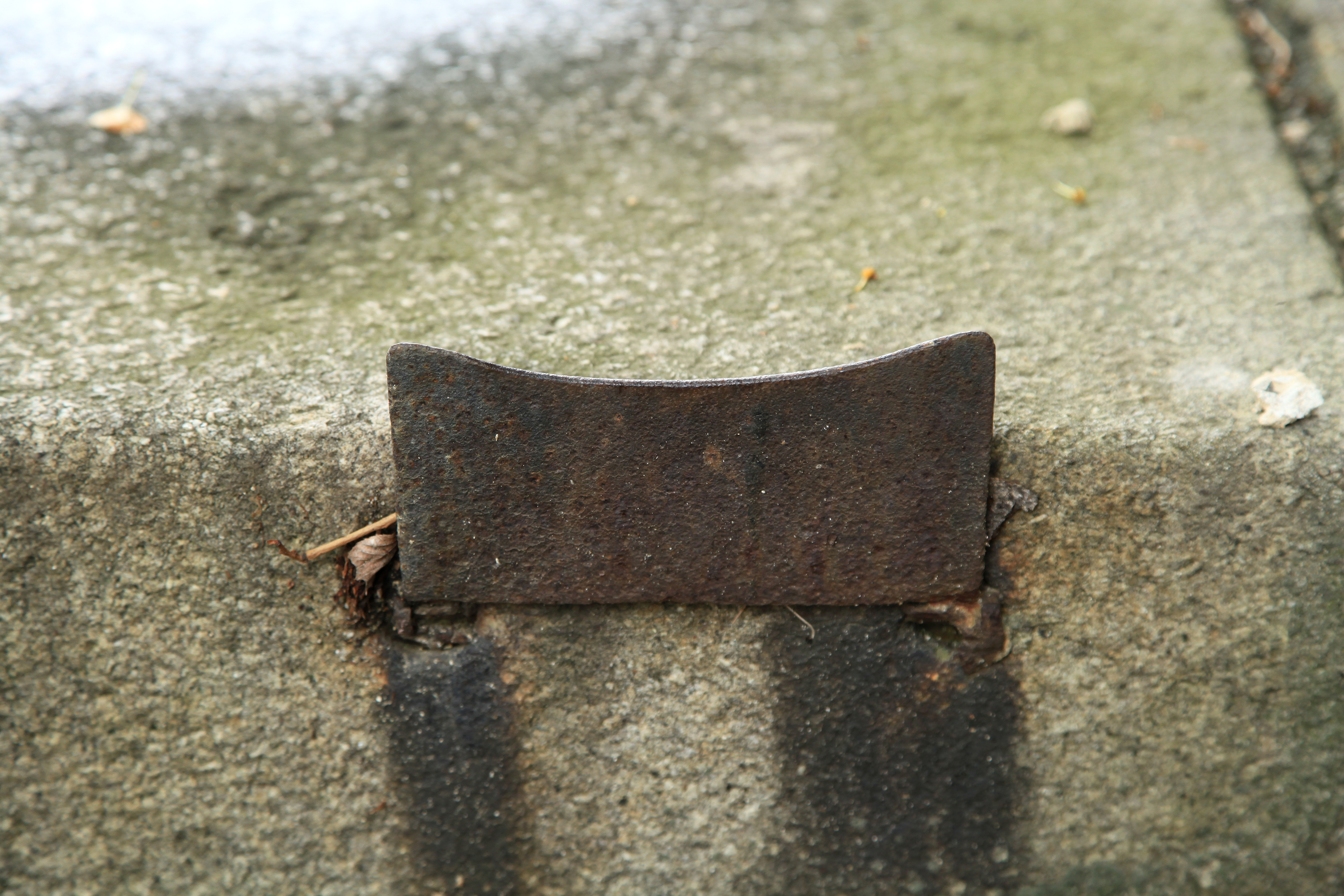 Kirche, Kirchgasse in Weißenberg